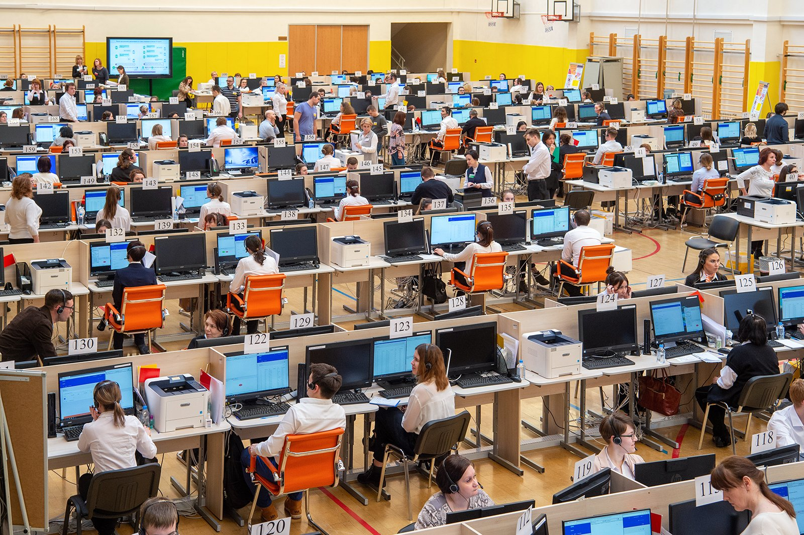 Посещение кол-центра Департамента здравоохранения Москвы (С. Собянин)